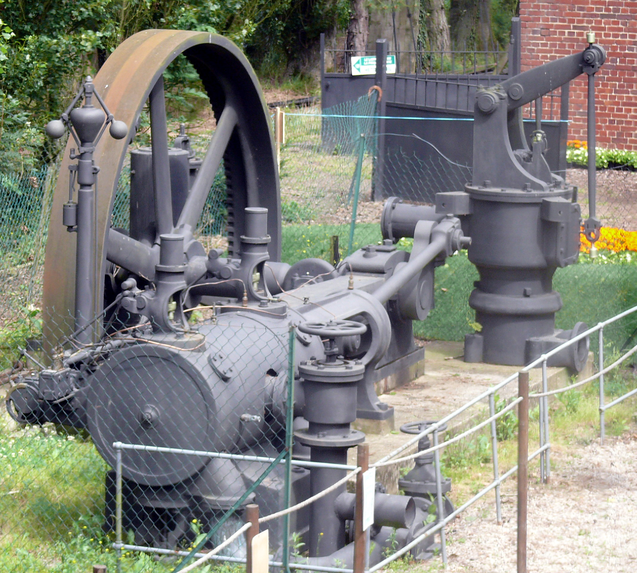 Ecomusée d'Hétomesnil (Oise) : machine à vapeur horizontale belge construite par Van de Kerkhove, acquise d'occasion en 1920 par l'ancienne scierie Bedin à Beauvais. Acquise pour l'écomusée en 1988.